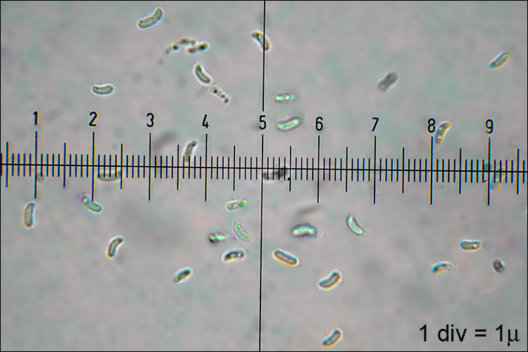 Plicaturopsis crispa (Pers.) Rea